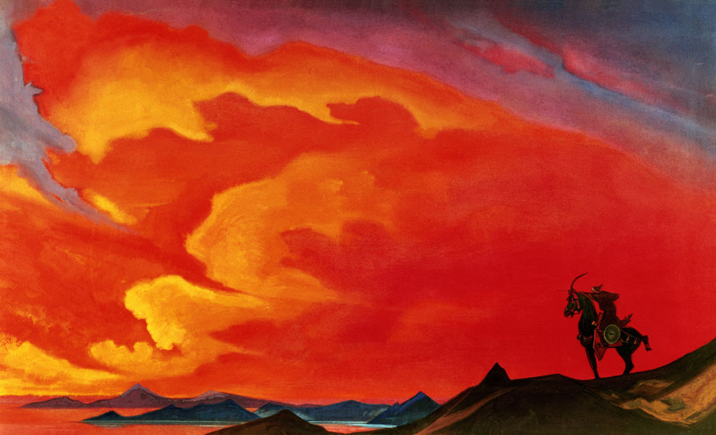 "Гэсэр-хан". Холст, темпера. 91х152,5